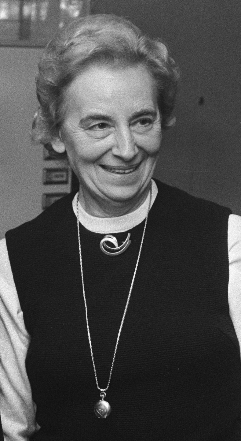 Simone Dubois De Bruyn